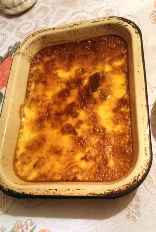 la leche asada un rico postre chileno